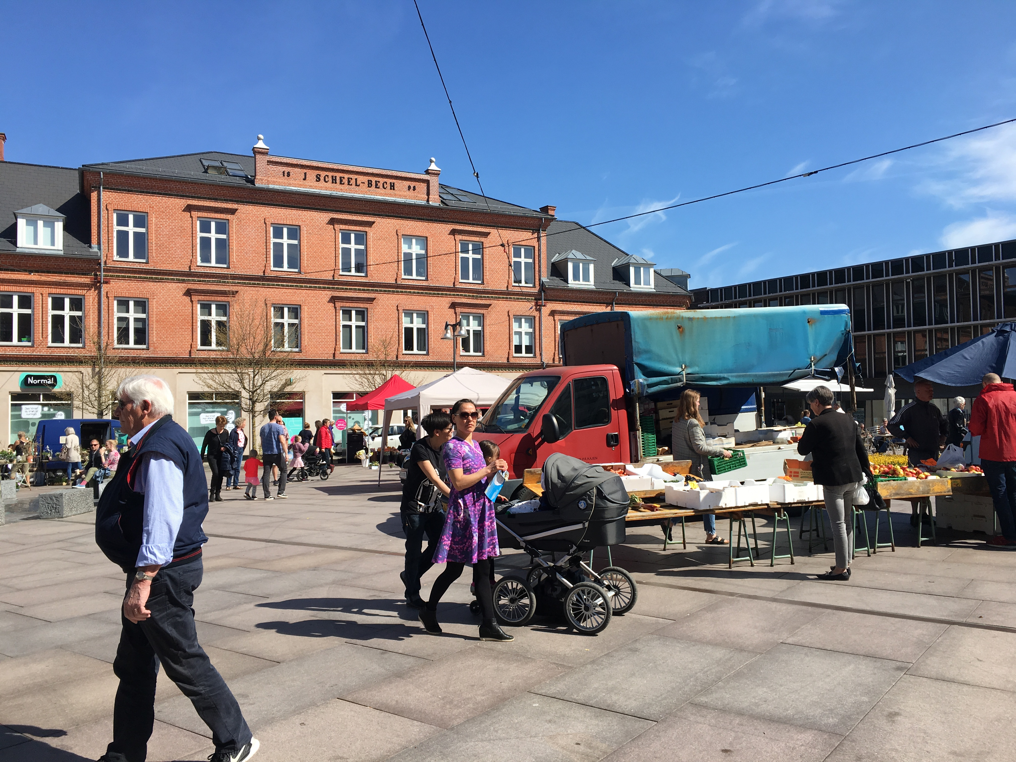 Axeltorv april 2019